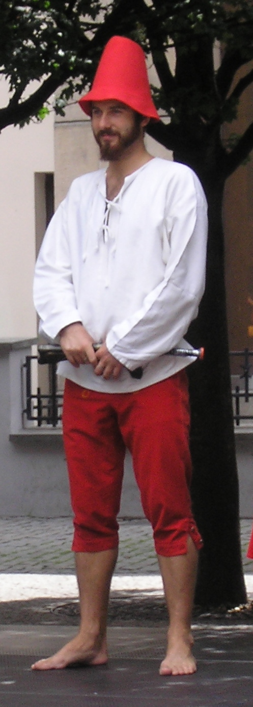 Herci ztvárňující v Praze na Staroměstském náměstí pohádku O loupežníku Rumcajsovi